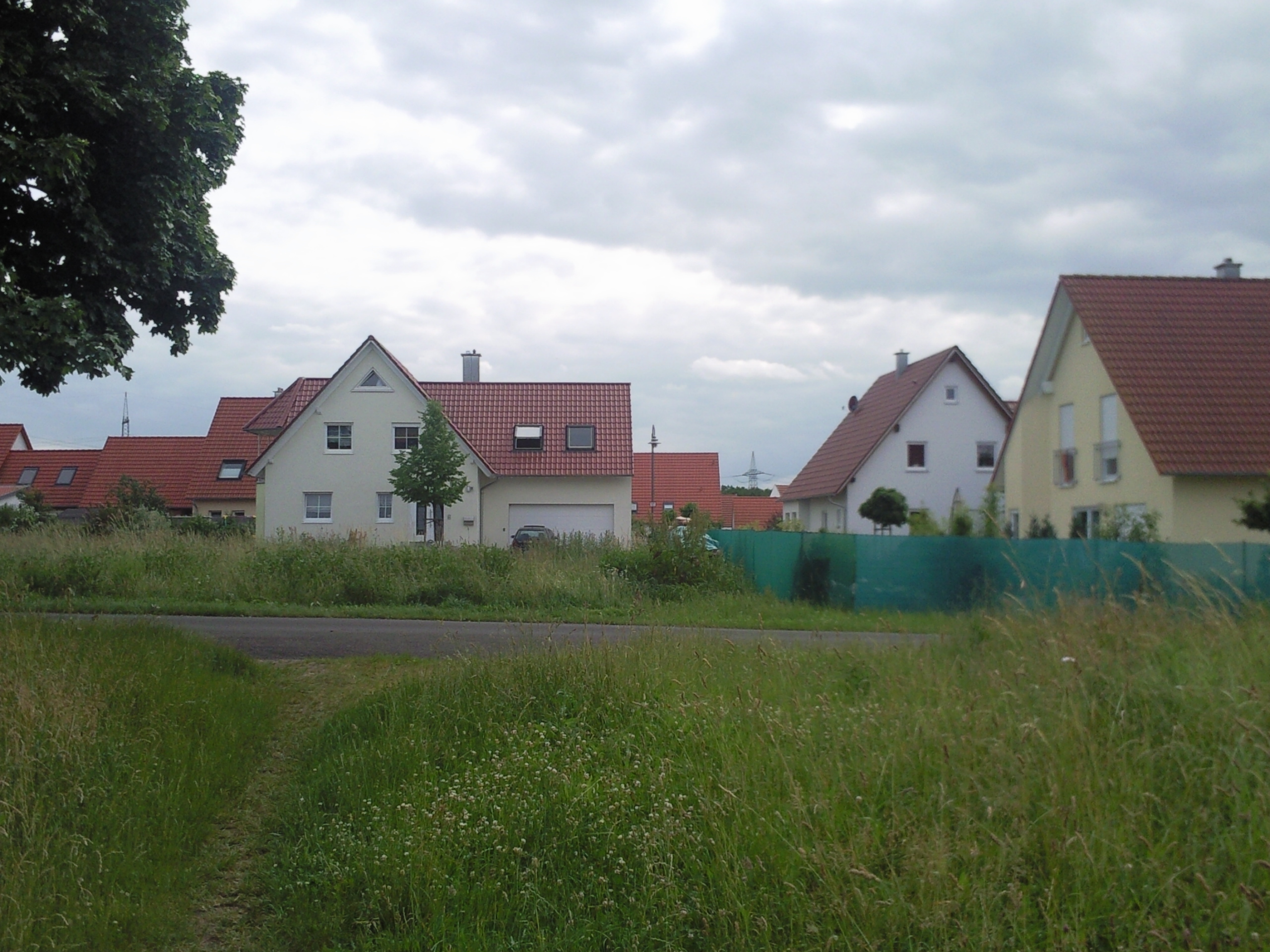 Neubau-Gebiete in Röthlein